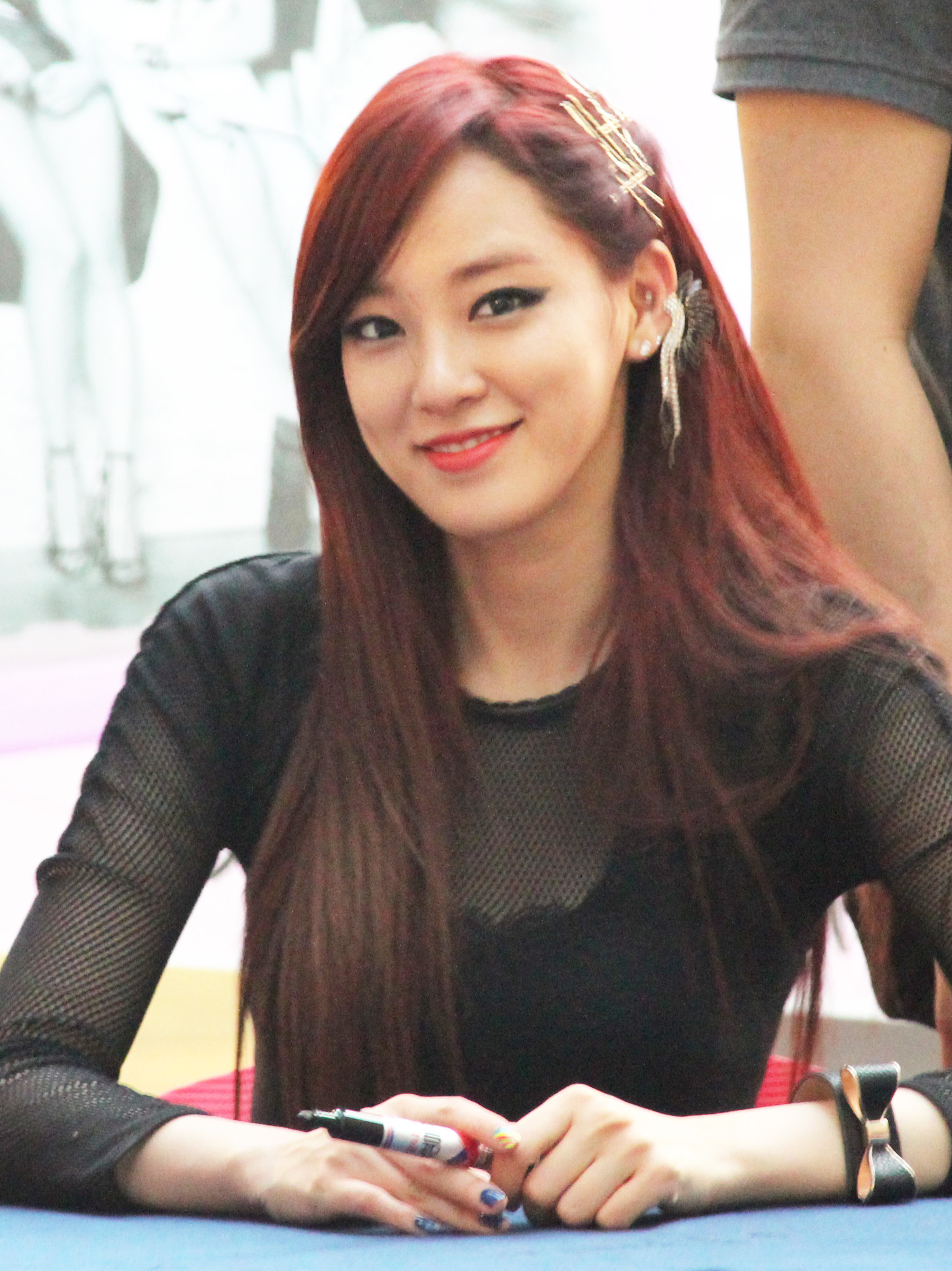 130629 애프터스쿨 메세나폴리스 '첫사랑' 팬싸인회